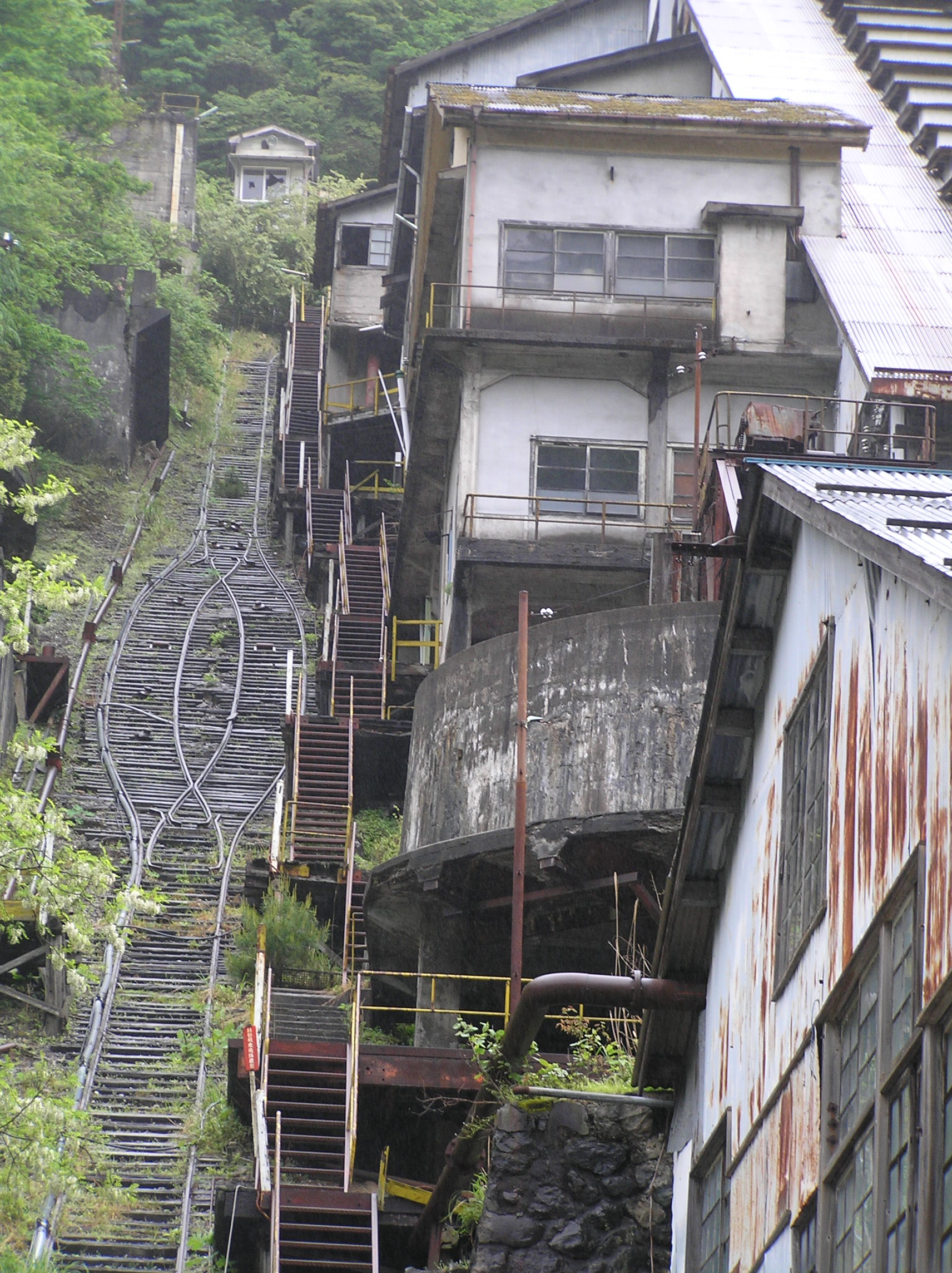 Akenobe-kozan,Mikobata-senkōsho 明延鉱業神子畑選鉱所